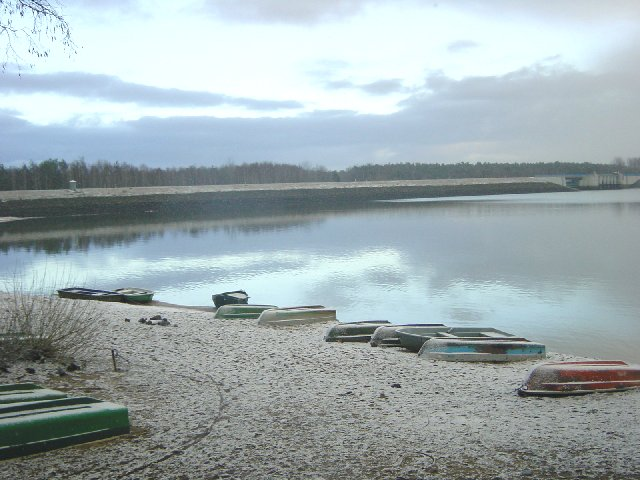 Talsperre Spremberg - Stausee mit dem 3700 m langen Staudamm; selbst fotografiert im Dez. 2004; GNU-FDL